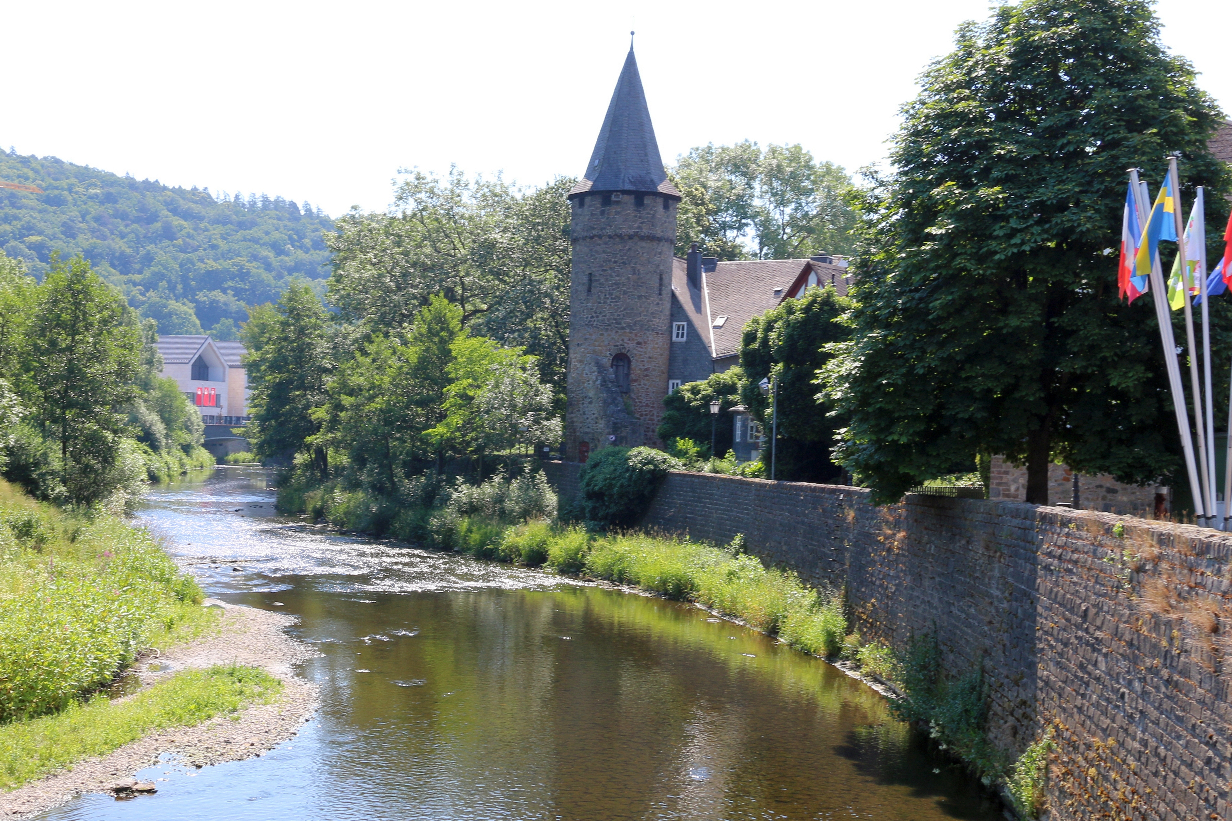 Herborn, Lahn-Dill-Kreis: Dillturm